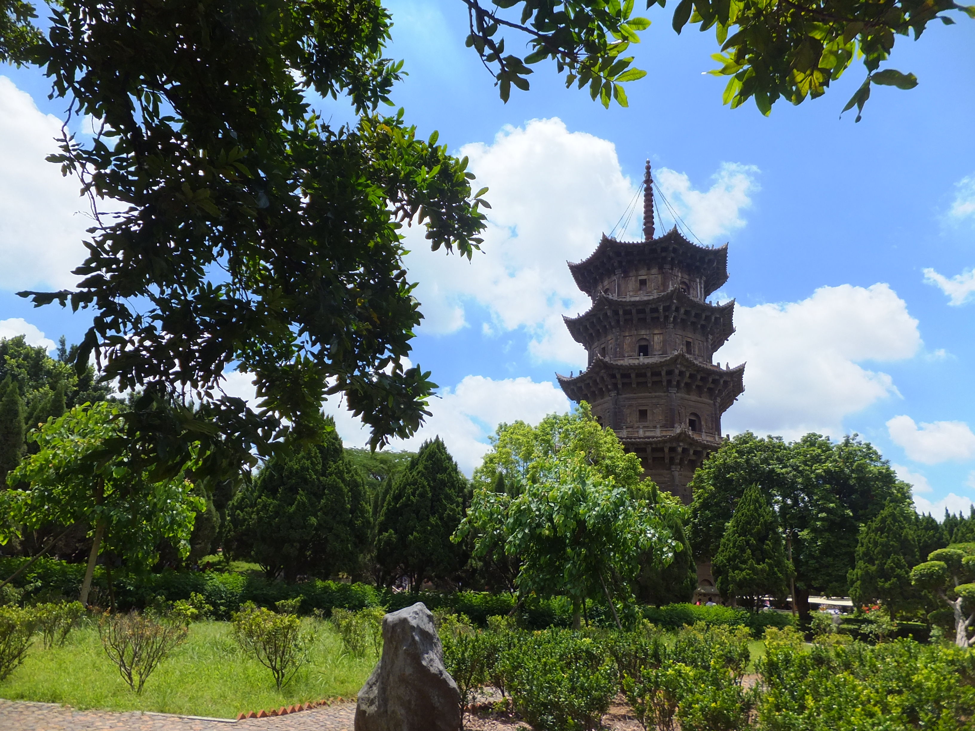 中文（中国大陆）: 开元寺镇国塔于唐咸通年间（860–874 年）建造，原为木制塔。宋绍兴二十五年（1155 年）和宝庆三年（1227 年），两次罹于火灾，改为砖塔。嘉熙二年(1238 年)始改建石塔，淳熙十年(1250 年)建成。它的建筑形制与仁寿塔（西塔）基本相同，高度48.27米，较仁寿塔高3.21米。而镇国塔建筑的时间则比仁寿塔晚了10 年。按一寺双塔的制两塔的规划与设计可能同时就决定了，只是施工有先后而已。 开元寺大雄宝殿前东西两侧，有一对石构空心塔。东塔名镇国塔，西塔名仁寿塔，两塔相距约二百米，全部仿木结构建造，为我国现存最高大的一对石塔。 双塔是可以登临的同类型石塔中做工最精细的，其建筑细部较忠实地反映南宋时福建地区的木构建筑的风格